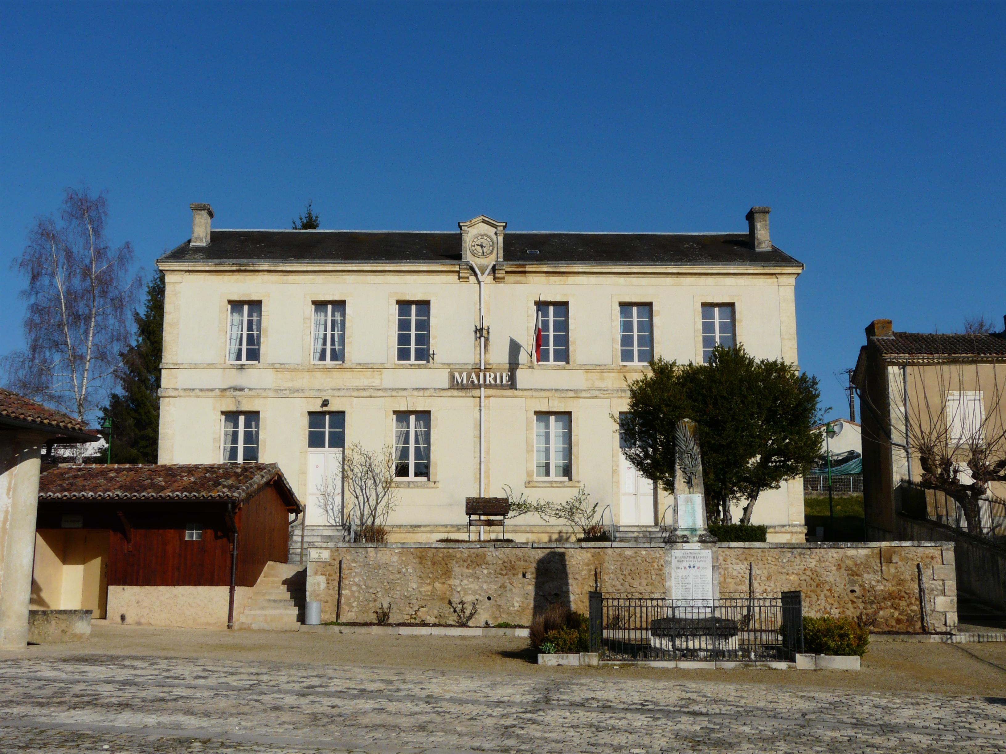 La mairie de La Douze, Dordogne, France.